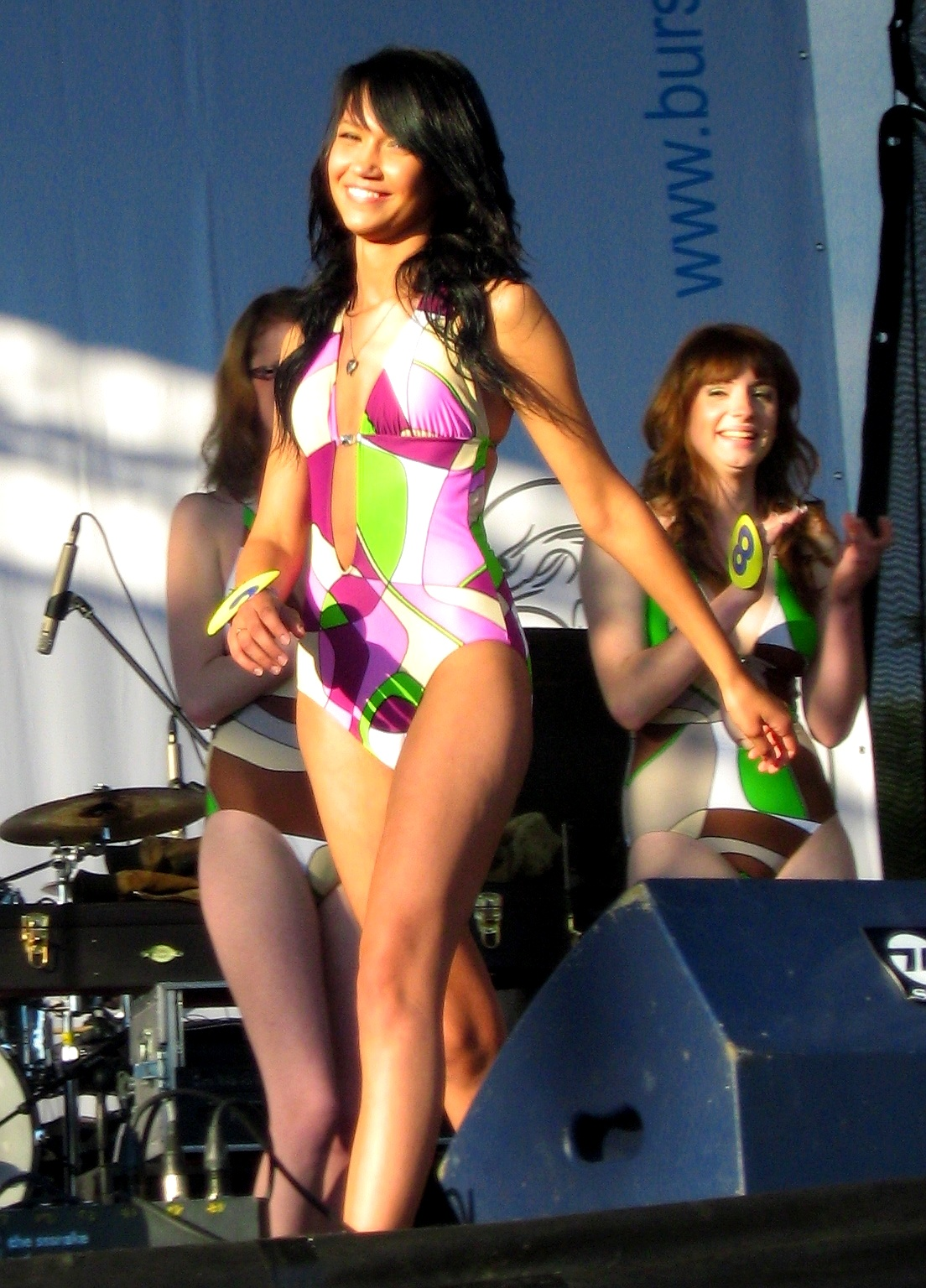 Aleksandra Buś - Bursztynowa Miss Świnoujścia 2009